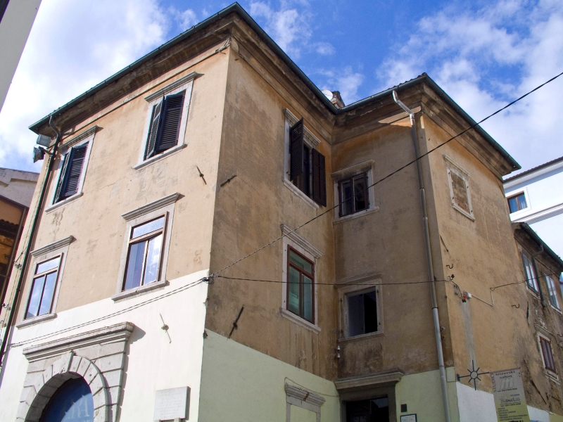 Palac komuna, Rijeka